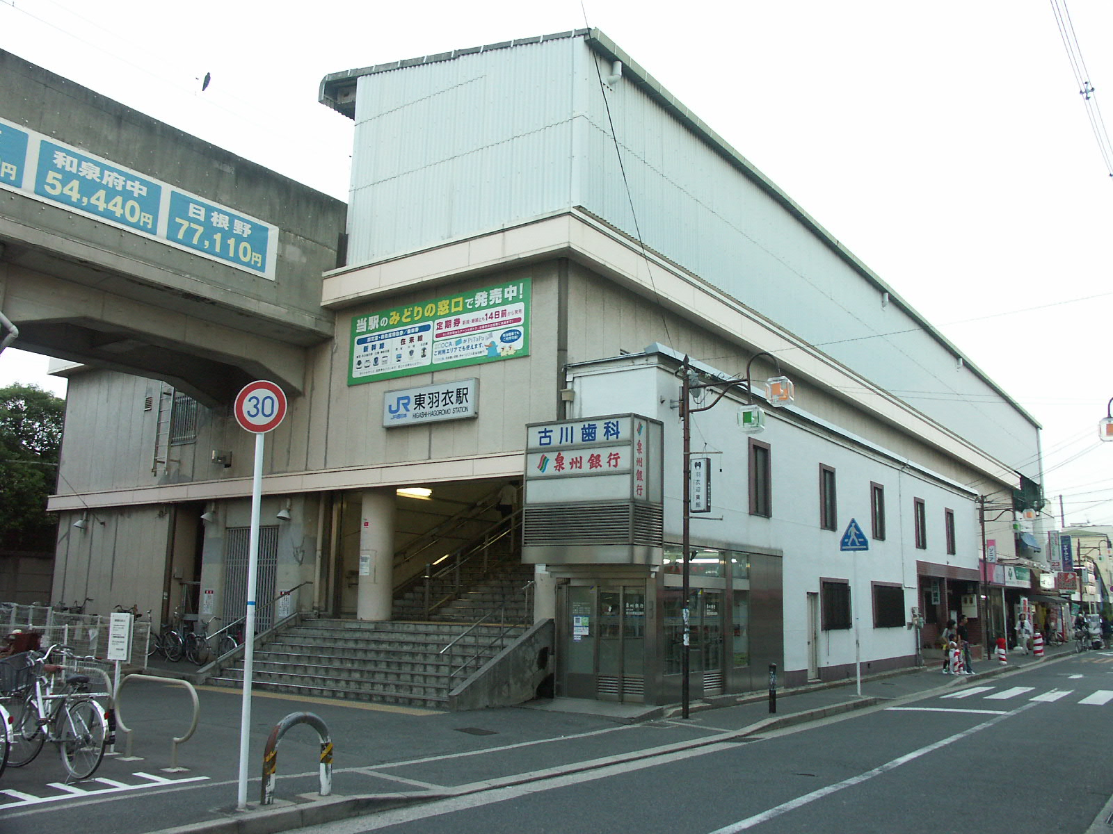 JR-West Higashi-Hagoromo Station, Hanwa-Line, Osaka (JR西日本 阪和線 東羽衣駅 外観）